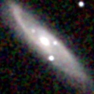 Galaxie NGC 7817